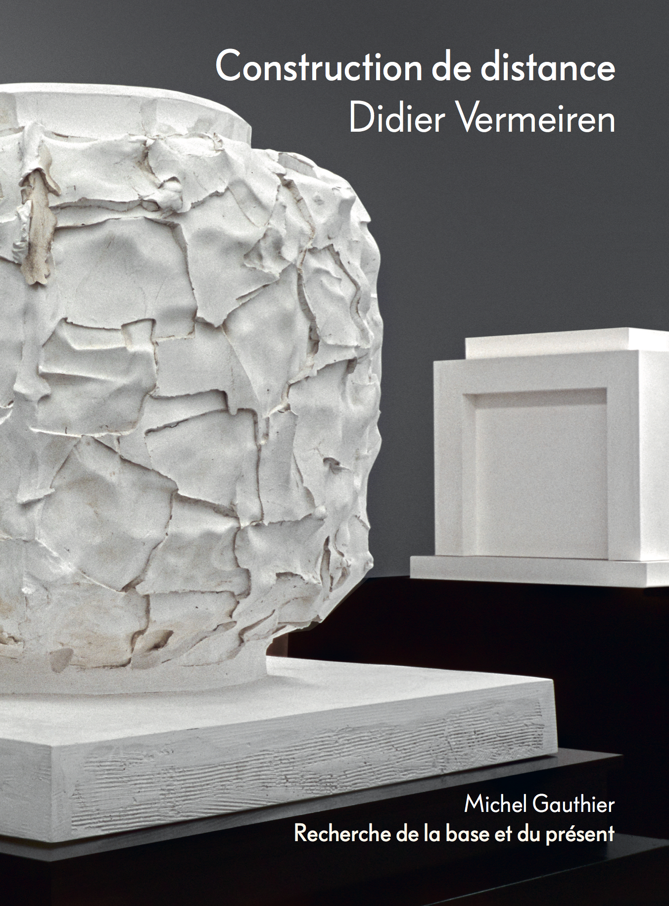 Couverture